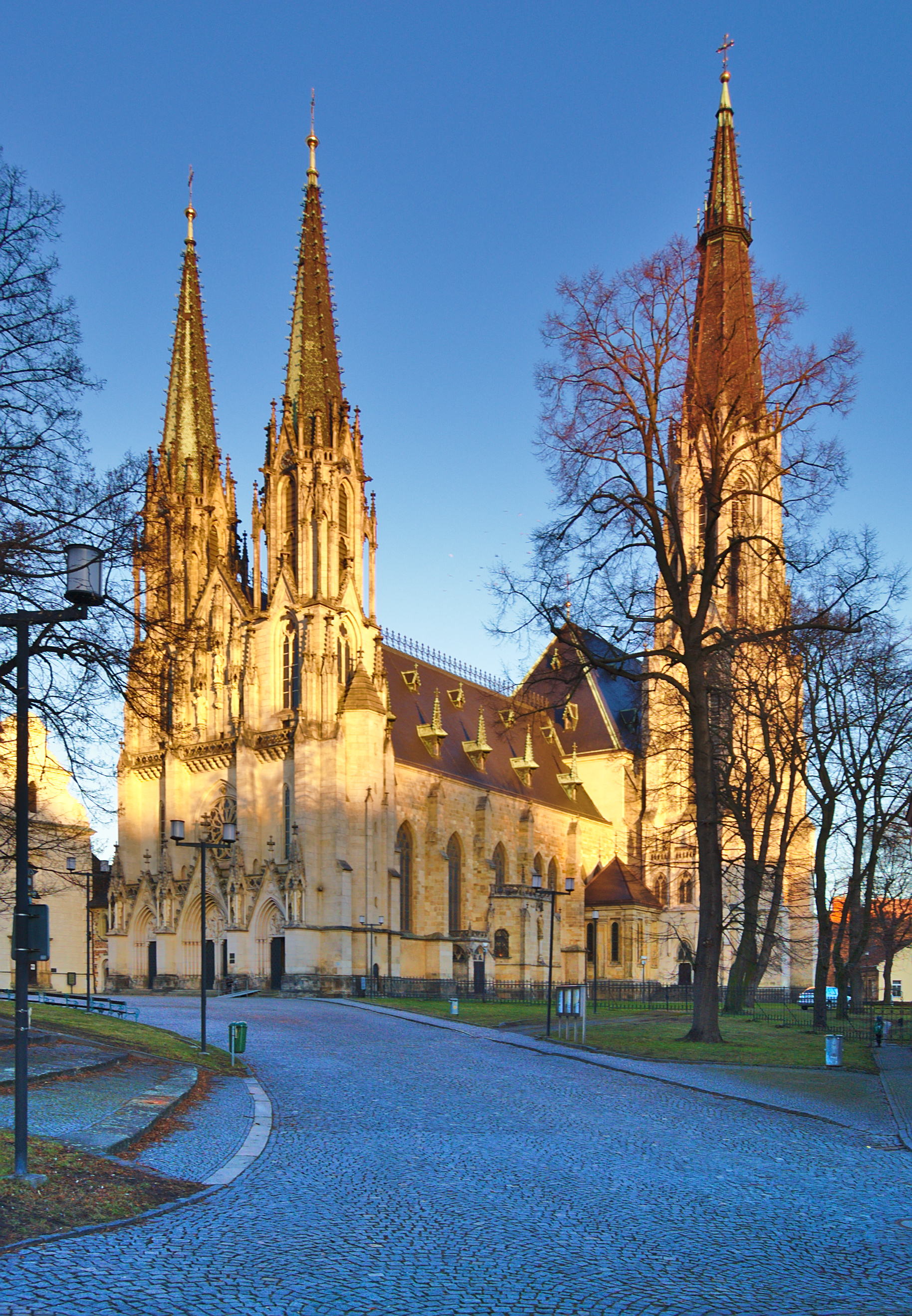 Katedrála svatého Václava, Olomouc